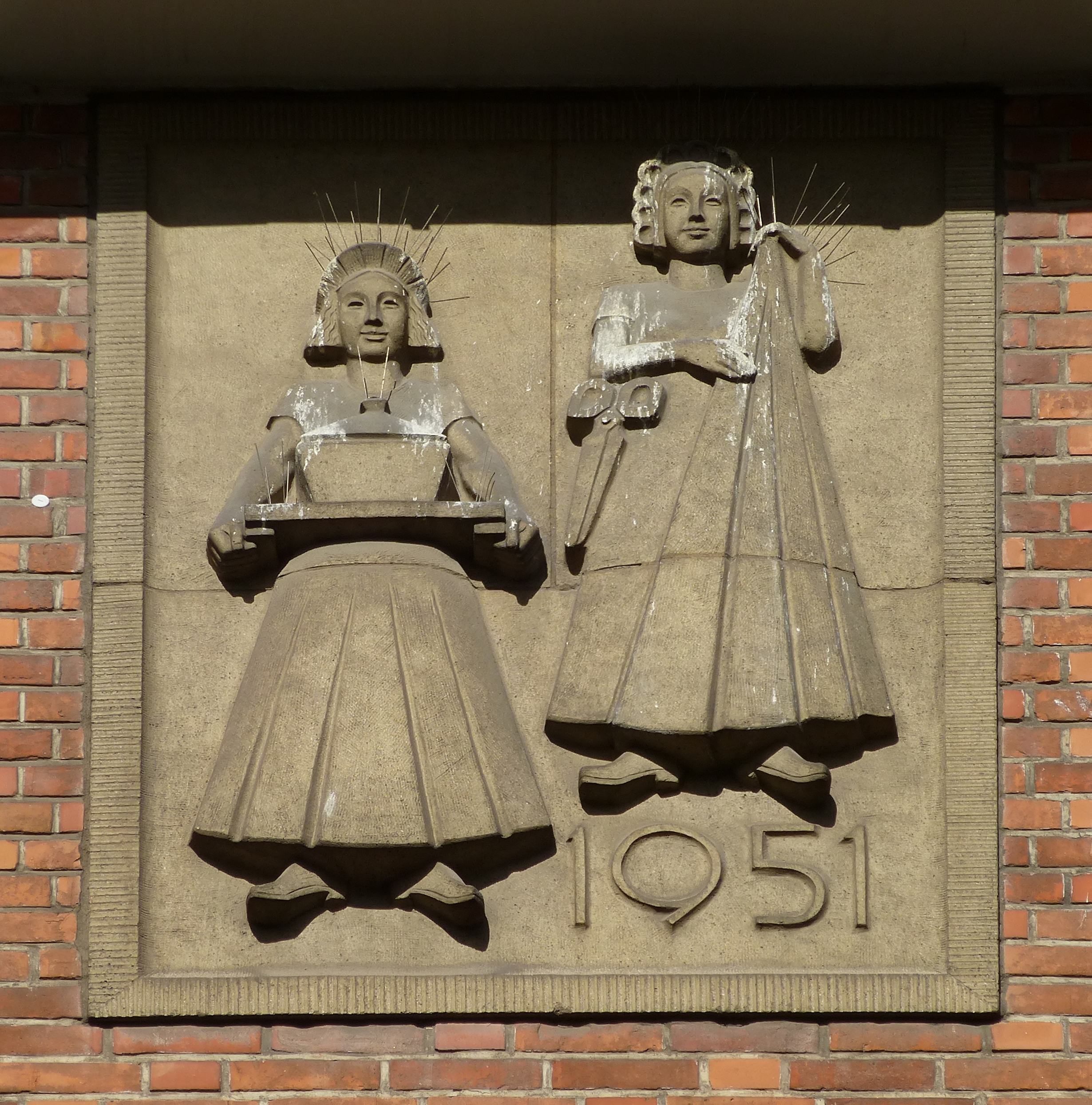 Frauen-Erwerbs- und Ausbildungsverein in Bremen, Carl-Ronning-Straße 2; FassadenzierDas abgebildete Objekt ist ein geschütztes Kulturdenkmal in der Freien Hansestadt Bremen, mit der Nr. 0258 beim Landesamt für Denkmalpflege registriert.